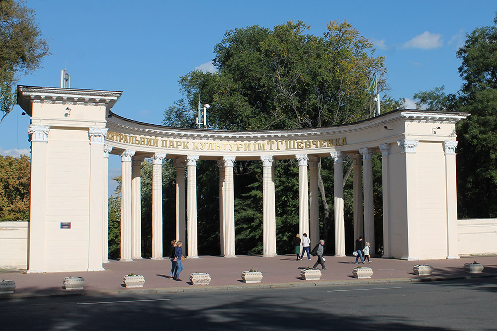 Колонада на вході до парка Шевченка у Дніпрі.